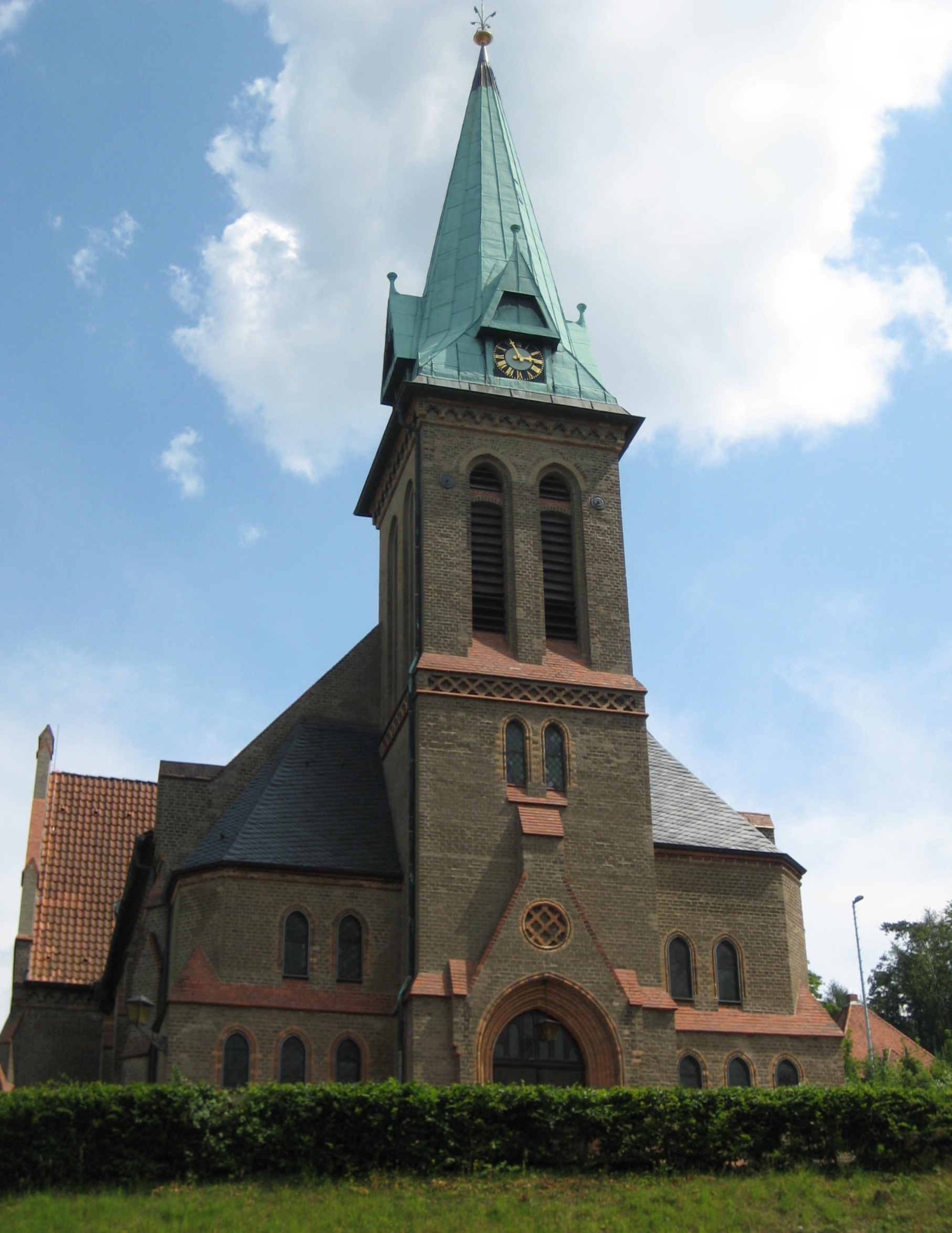 Lutherkirche